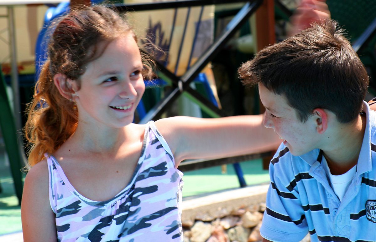 Kosovar Albanian children in Prizren